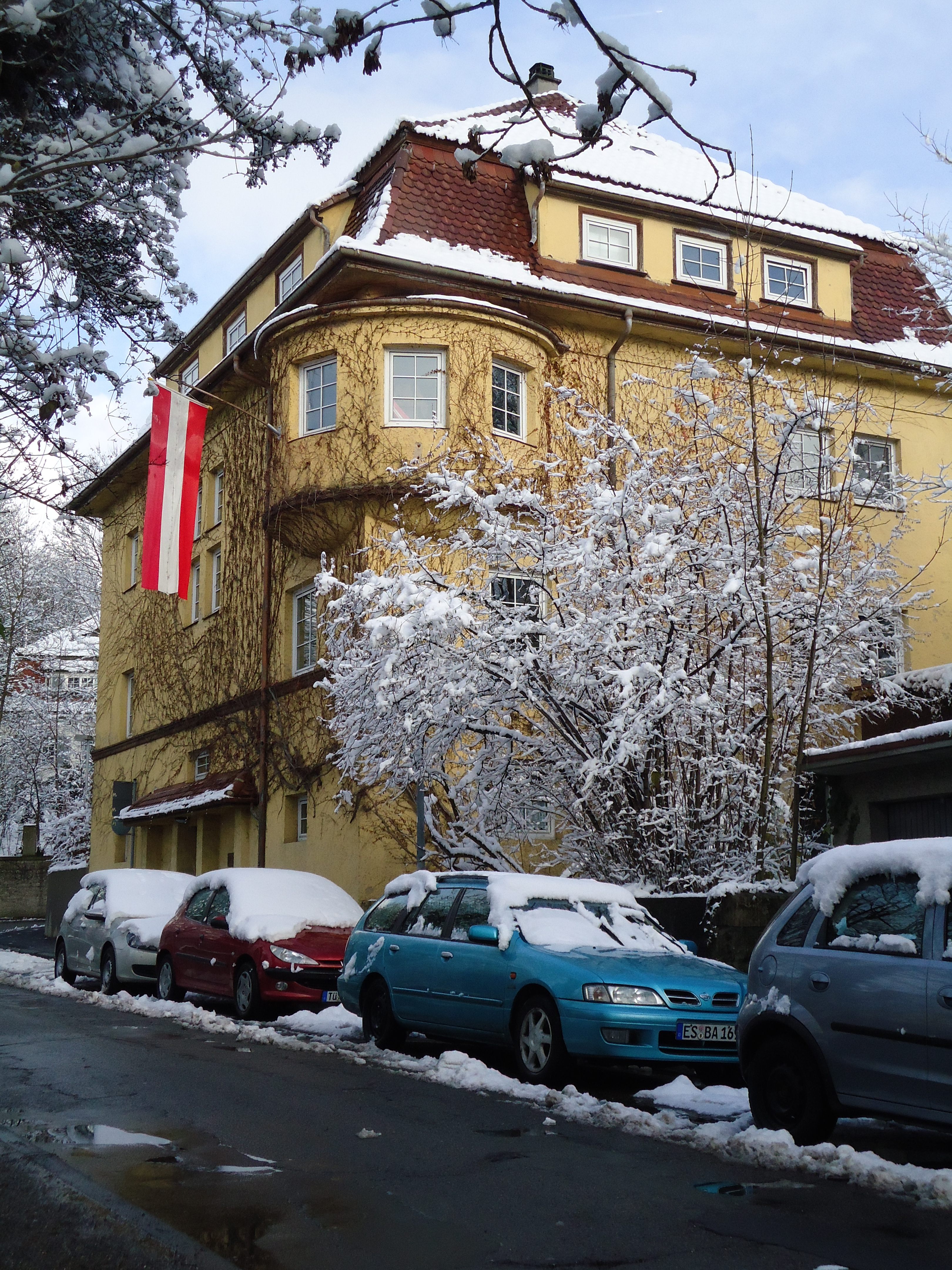 Arminenhaus